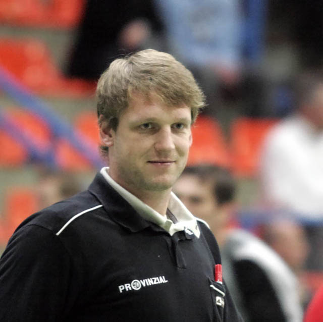 Klaus-Dieter Petersen am 30. Dezember 2006 in der Aschaffenburger Unterfrankenhalle vor dem Spiel TV Großwallstadt - THW Kiel (25:30)